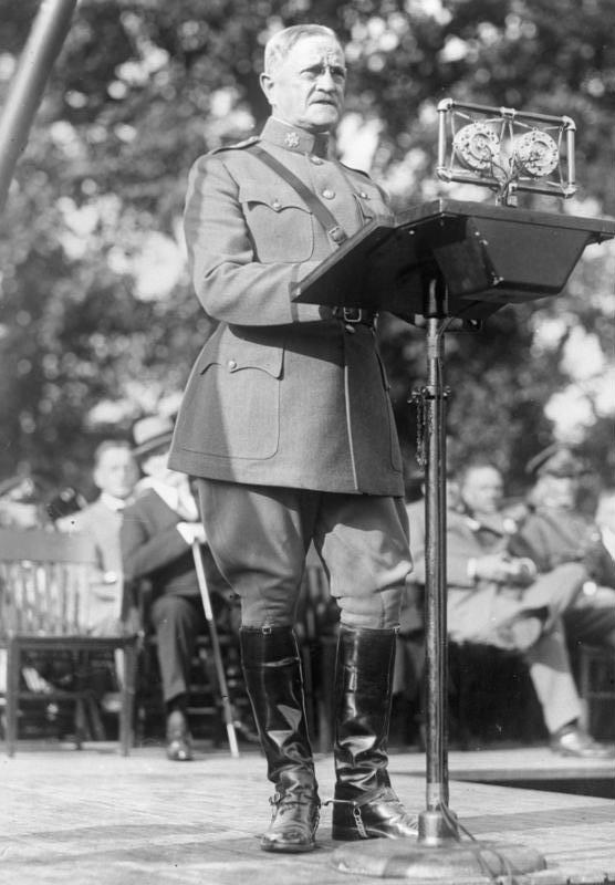 General Pershing, der Oberbefehlshaber der amerikanischen Truppen während des Weltkrieges, tritt hervorragend für die Revidierung des Verseiller Friedensvertrages ein ! General Pershing bei seiner deutschfreundlichen Rede vor dem Mikrophon in Washington.